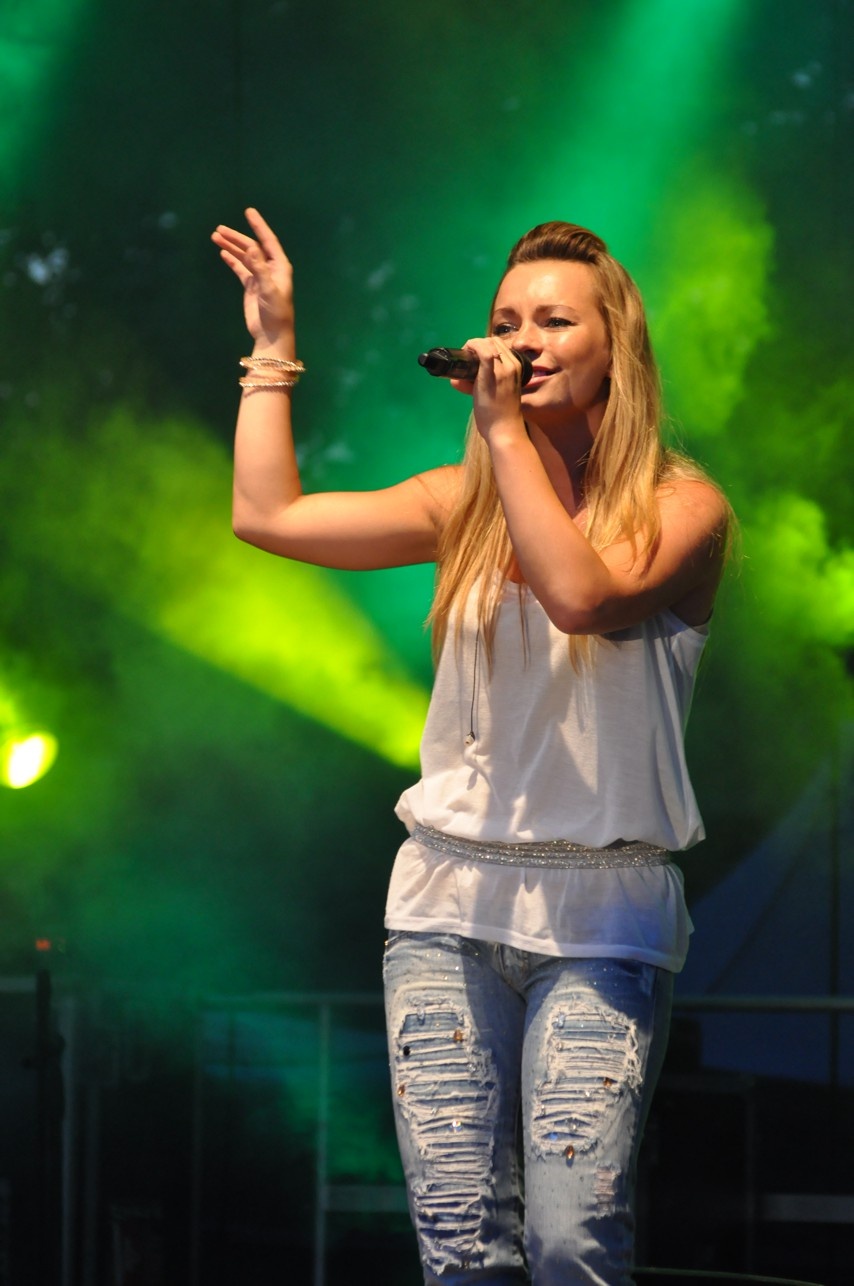 XXXXX